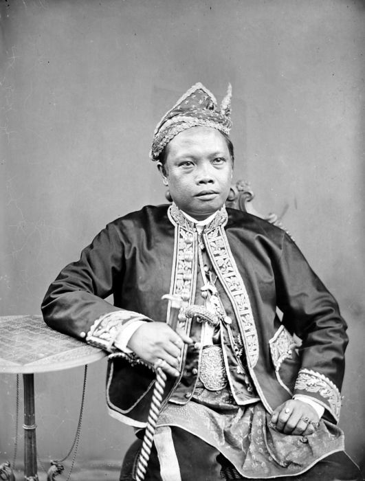 Negatief. Portret van de Ronggo van Banjarmasin, Raden Tominggong (Tomenggung) Suria Kasuma